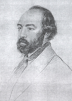 Bernhard Grueber (1807 - 1882), Rakouský architekt a pedagog na portrétní kresbě od Georga Kordika.